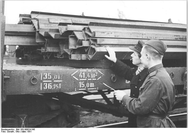 ADN-ZB Donath Ex- und Import Handelsverträge und Vereinbarungen zum gegenseitigen Warenaustausch zwischen der DDR und der Sowjetunion, sowie zwischen der DDR und den Volksdemokratien, bilden die Grundlage für den verstärkten Außenhandel. UBz: Einen Güterzug mit Profileisen, Walzblechen, Roheisen und Rohstahl übergibt ein Soldat der sowjetischen Begleitmannschaft dem Kollegen vom deutschen Zoll auf dem Güterbahnhof Frankfurt/Oder. Aufn. März 1951